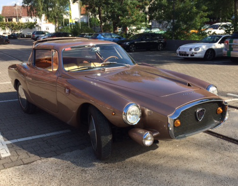 Der Prototyp Lancia Loraymo von Raymond Loewy